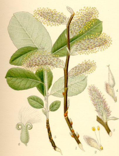 Gråvide (Salix cinerea) gren med hanax, hanblomma med skärmblad (3/1), honax, honblomma med skärmblad, gren med blad, moget fröhus (5/1).